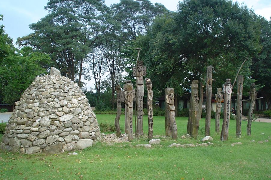 천하대장군, Cheonha daejanggun(Korean traditional totem pole)